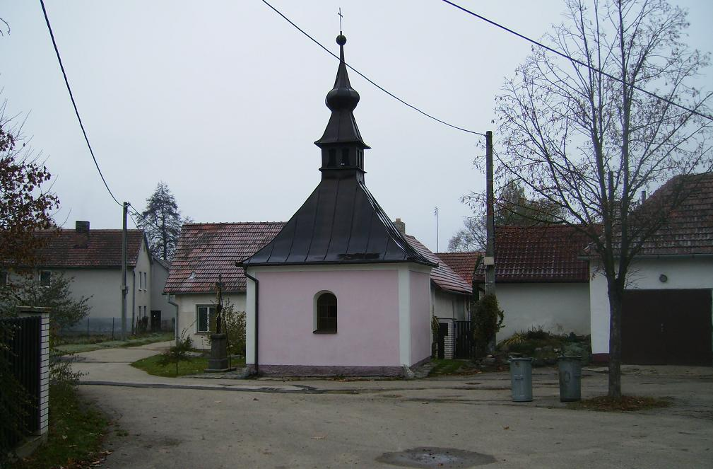 Oslavička na Moravě (u Velkého Meziříčí)